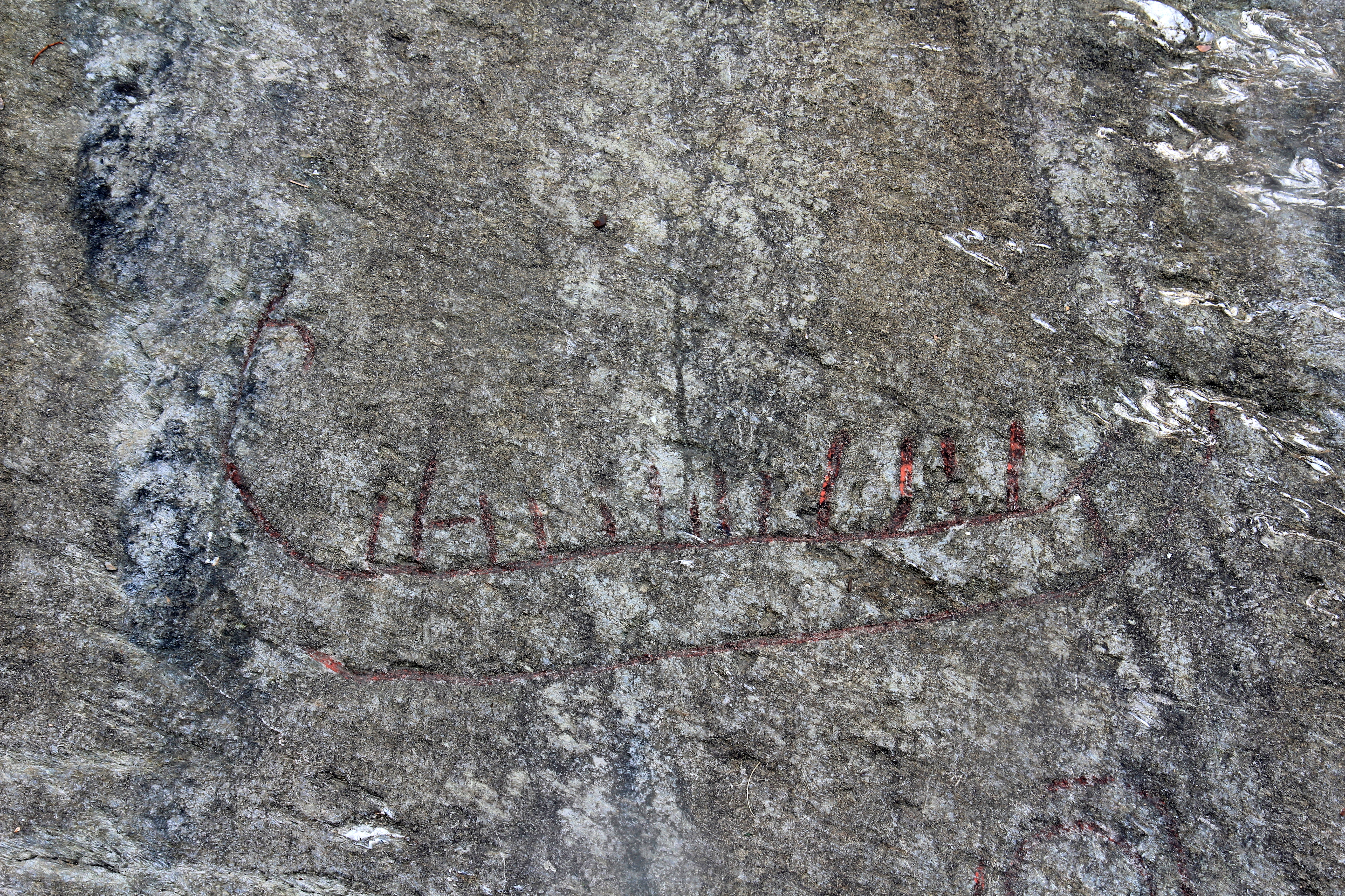 Rudlå 2, Helleristning ved Kampen i Stavanger